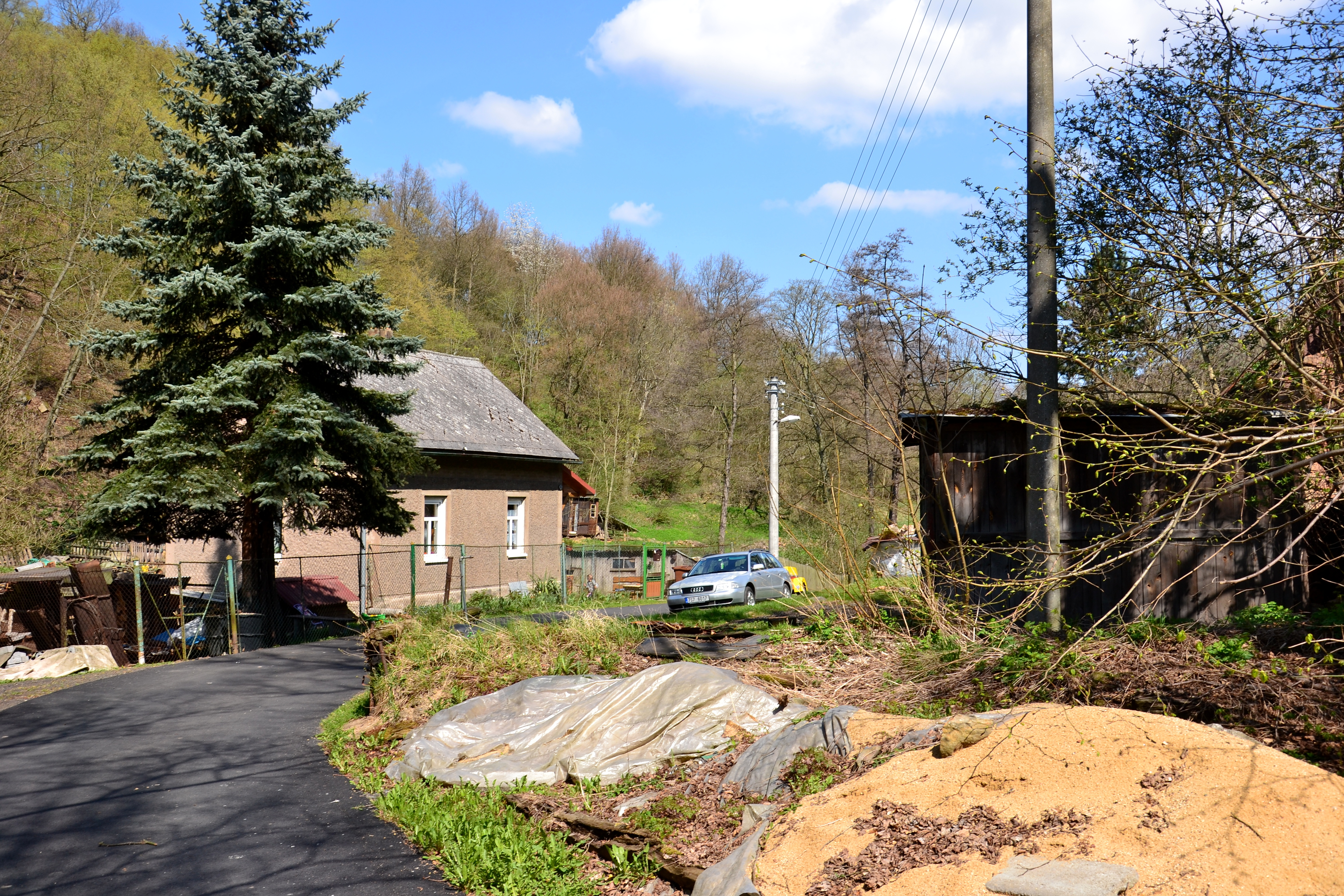 Dům nad potokem